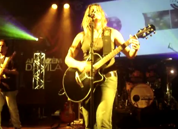 Show da banda Thó em 2006.